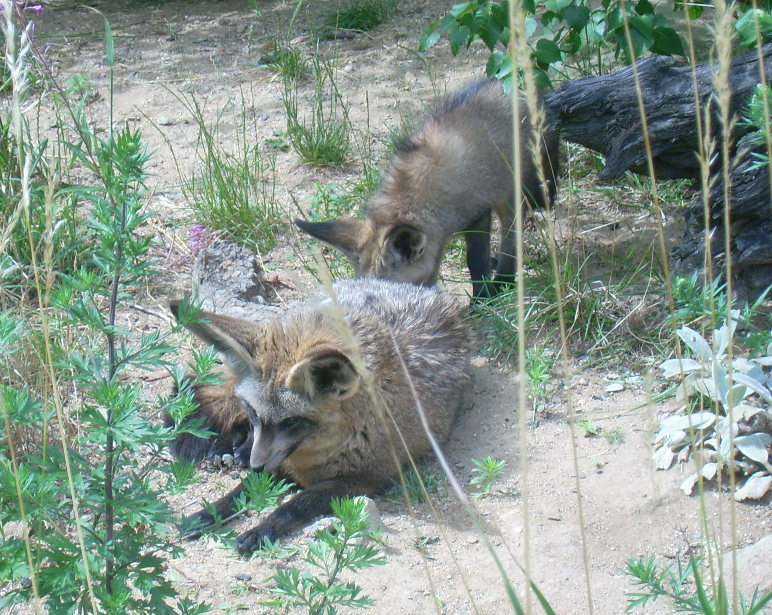 Löffelhunde. Kiswahili: Bweha masikio.